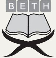 Logo choisi par BETH en 2008 pour son site web.